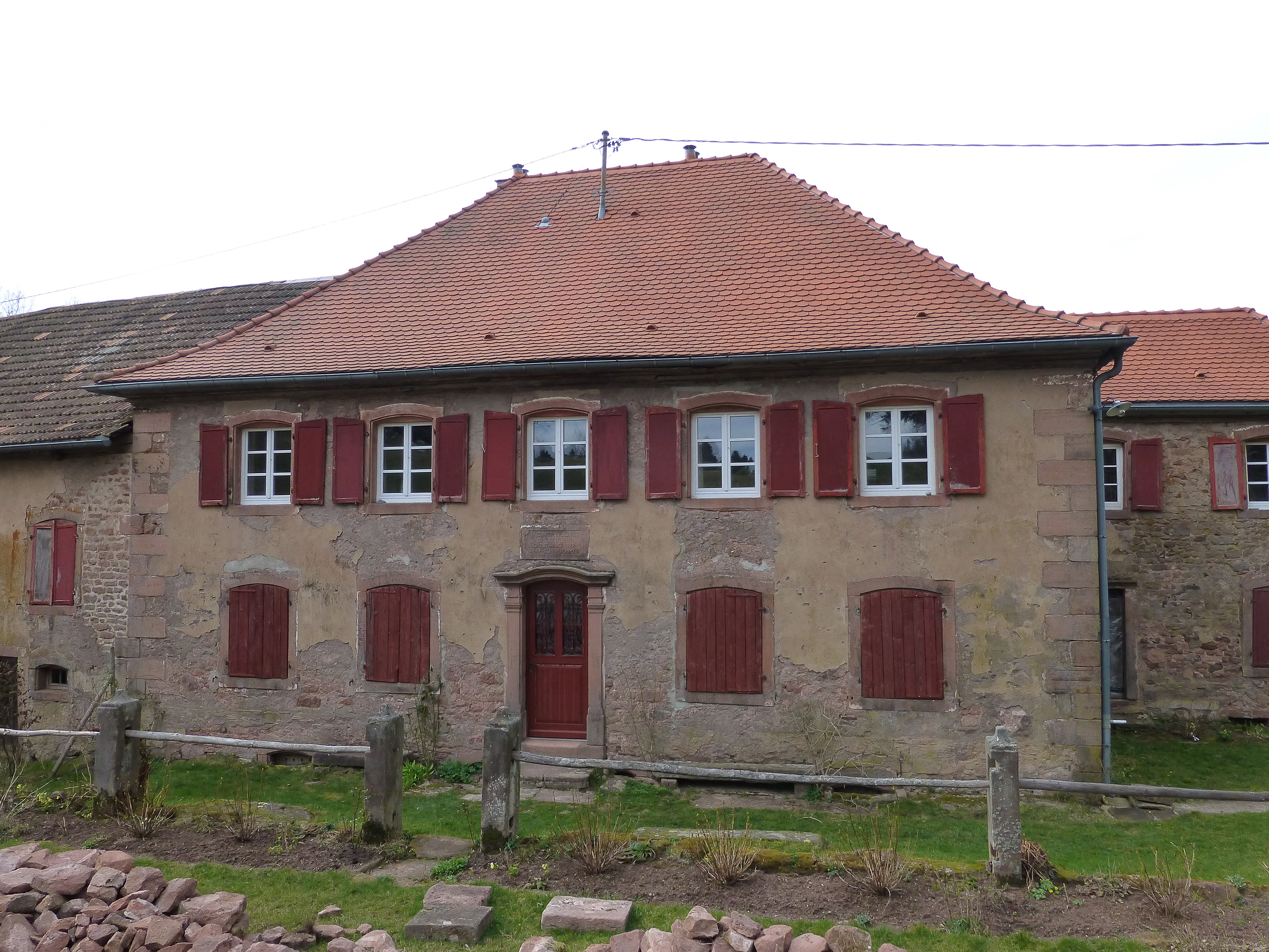 La Broque (Bas-Rhin) : ancienne ferme mennonite de Salm (ou ferme Kupferschmit), inscrite MH